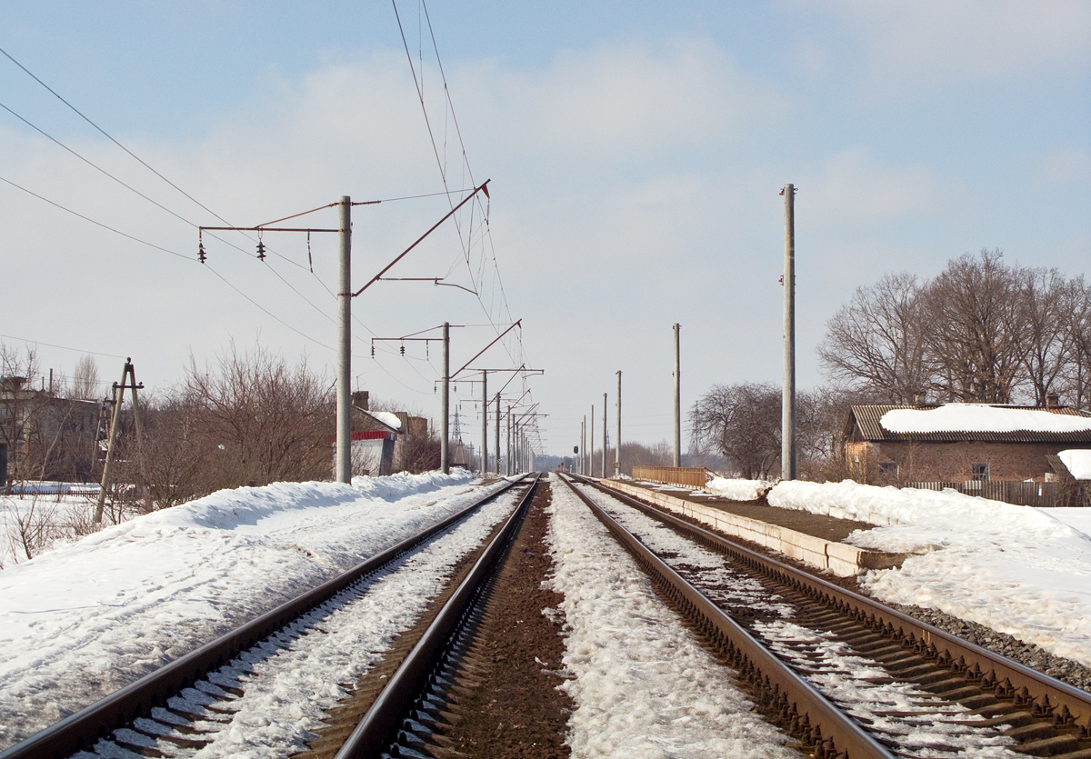 З.п. Залізобетонний